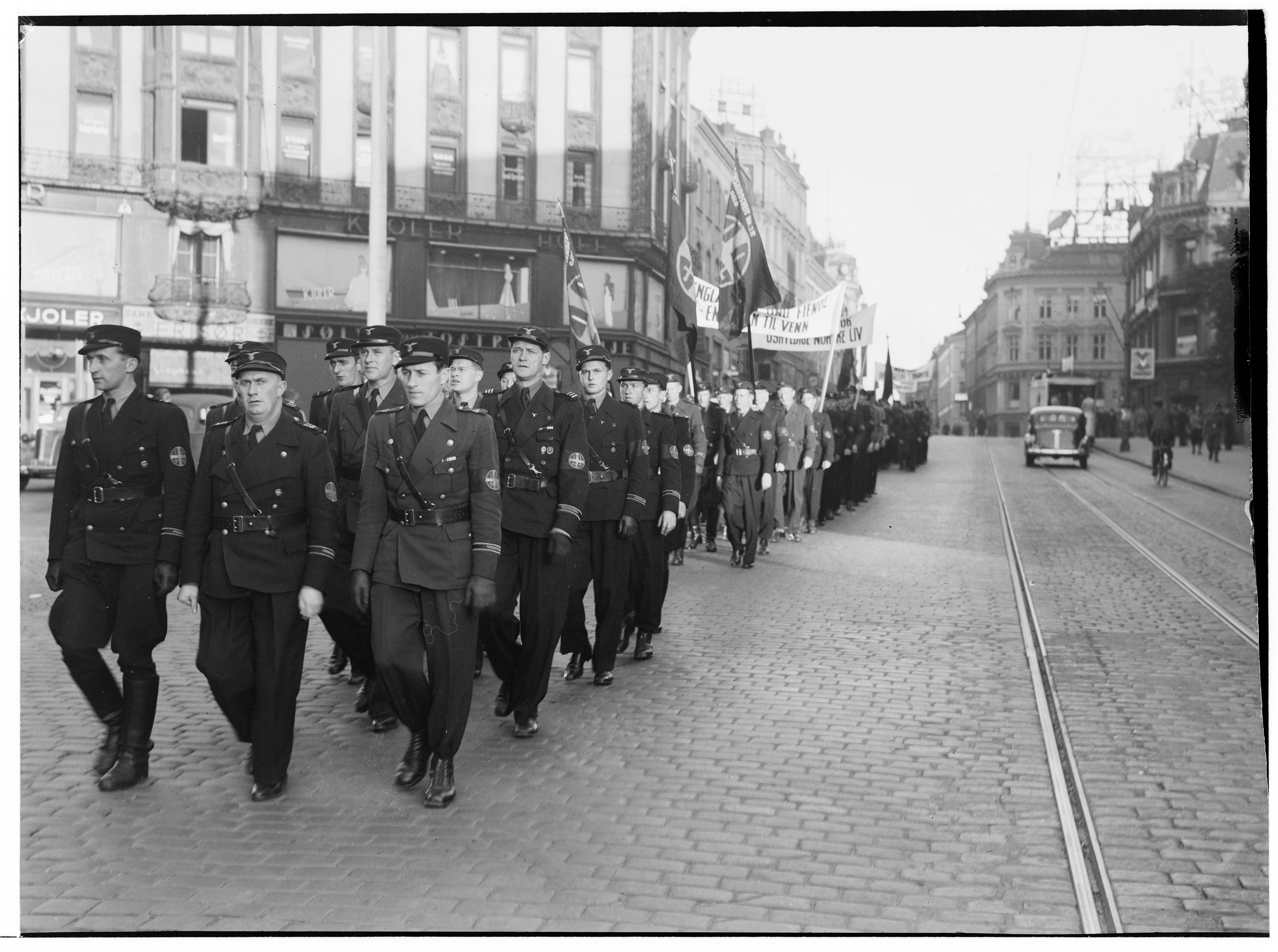 «Nasjonal Samling. Protestmøte på Universitetsplassen. Statsråd Lunde taler.»Under andre verdenskrig i Norge arrangerte Nasjonal Samling (NS) 16. september 1941 demonstrasjonstog i Oslo med påfølgende protestmøte «mot England og jøssinger» på Universitetsplassen. NS-minister Gulbrand Lunde talte og sivile Oslo-borgere og hirdavdelinger deltok. Foranledninga var blant annet den britiske torpederinga av to norske hurtigruteskip 13. september 1941 der 211 mennesker omkom: Klokka 03:48 senka en torpedo sluppet fra et britisk krigsfly DS «Barøy» ved Hamarøy og drepte 112 mennesker (18 ble reddet), mens en britisk ubåt samme formiddag torpederte DS «Richard With» ved Rolvsøya og tok livet av 99 mennesker (31 overlevde). Etter Tysklands angrep på Sovjetunionen 22. juni 1941 hadde dessuten britene 3. september destruert strategiske objekter (oljelagre, radiostasjoner mm.) på Svalbard og evakuert den norske befolkninga der til Storbritannia.Bildet viser medlemmer av Rikshirden i demonstrasjonstoget ved Tostrupgården på Karl Johans gate i Oslo. Foran fra venstre går regimetsfører Sverre Tidemand Ruud (30 år, leder for Regiment Viking, som omfatta Stor-Oslo, det vil si Oslo og deler av Akershus), Orvar Sæther (37 år, fungerende stabssjef i Rikshirden i 1941) og ungsveitfører Ola Woxen Johansen (Sæthers adjutant i hirdstaben). I rekka bak sees friidrettsutøveren og idrettslederen Charles Hoff (39 år) ytterst til høyre. Også Filmavisen 29. september 1941 har kort propagandareportasje om «Demonstrasjon mot England».NB! CC-lisensene angir hvilke vilkår som gjelder for videre bruk av fotografiet. Arkivverket ber om at vilkårene for bruk respekteres. Fotograf, rettighetshaver og bevaringsinstitusjon skal i alle tilfeller krediteres.